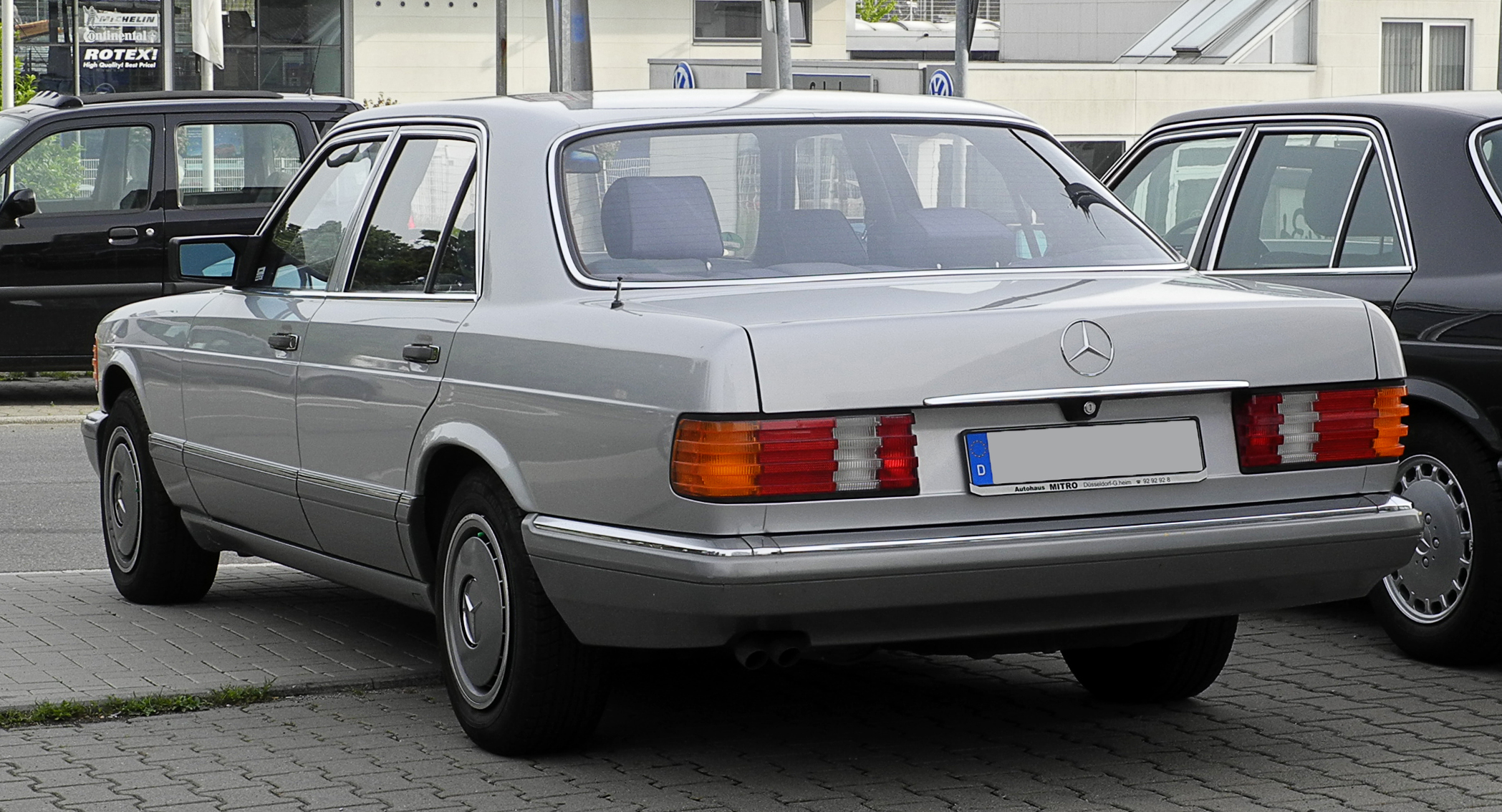 Mercedes-Benz 300 SE (W 126, Facelift)